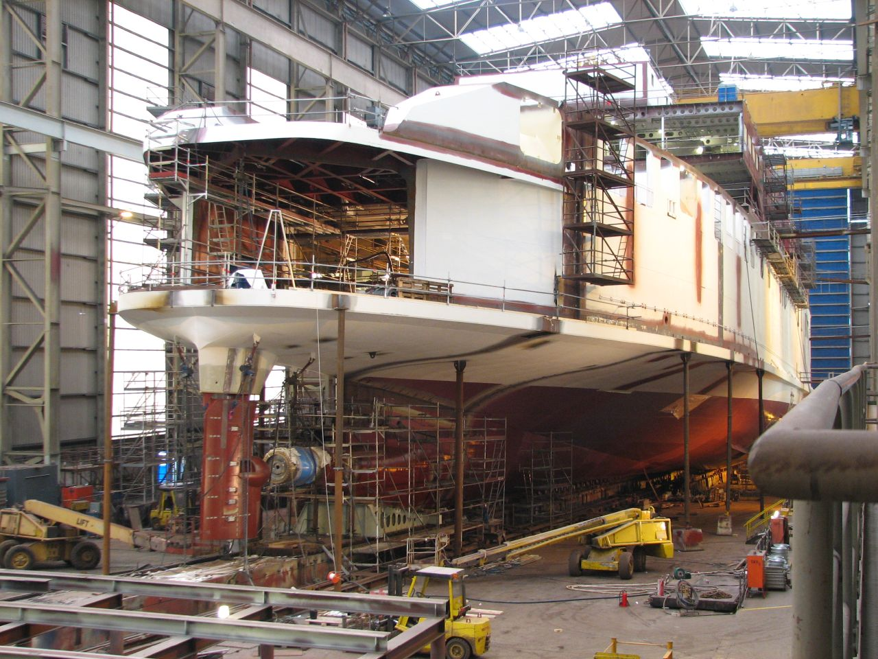 Flensburger Schiffbau Gesellschaft